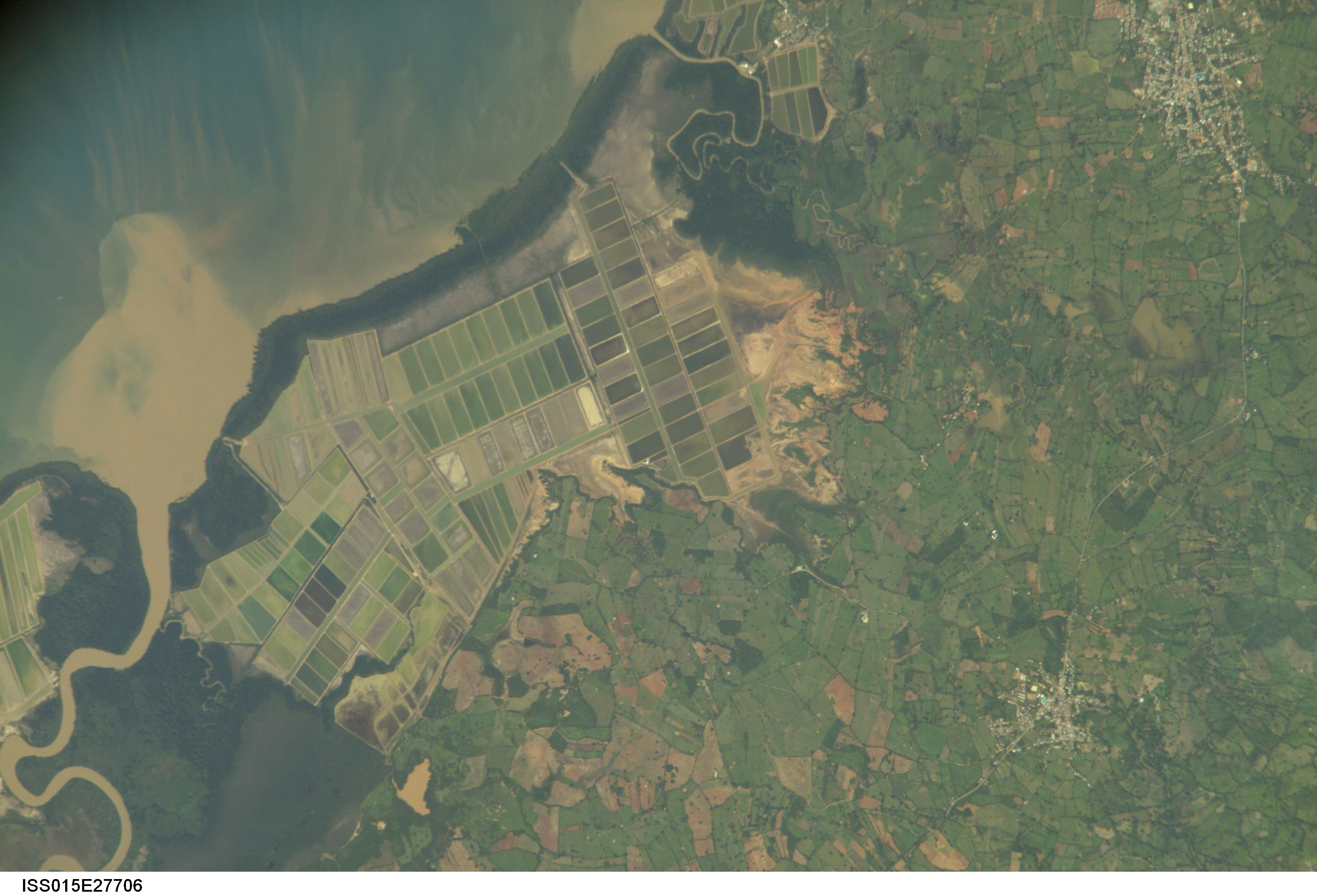 Vista satelital del área entre la desembocadura del río Santa María y el río Parita, con la ciudad de Chitre a la derecha.